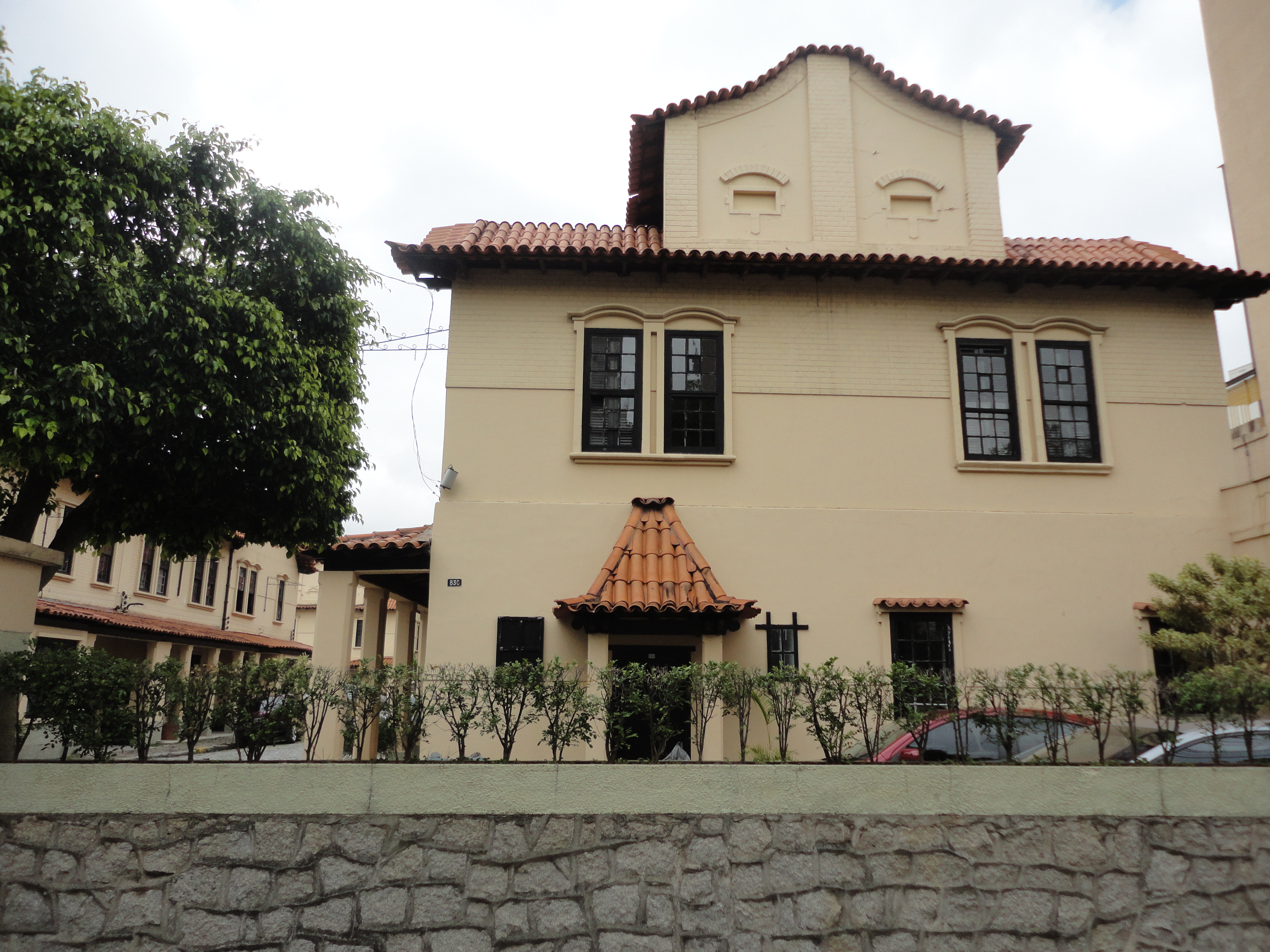 Detalhe da fachada da Vila dos Ingleses, em São Paulo (SP), Brasil.